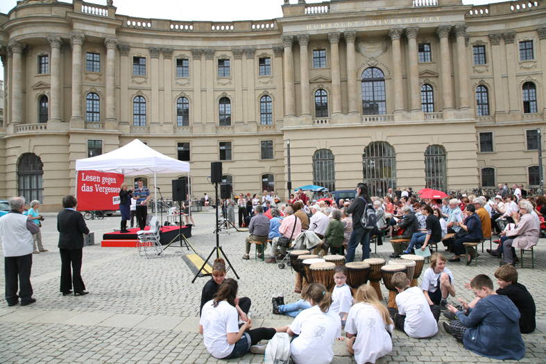 Die Bundestagsfraktion DIE LINKE lud auch in diesem Jahr zum Lesen gegen das Vergessen auf den Berliner Bebelplatz. Damit soll an die Bücherverbrennung von 1933 und den Umgang der Nationalsozialisten mit Andersdenkenden erinnert werden. Die Werke der Autoren, deren Bücher verbrannt wurden, kann man neu auflegen, die verbrannten Menschen bleiben verloren.